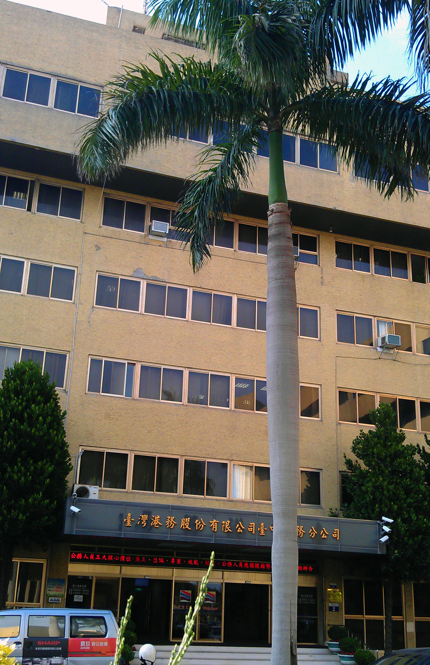 臺灣港務股份有限公司臺中港務分公司，位於臺中市梧棲區臺灣大道十段2號。